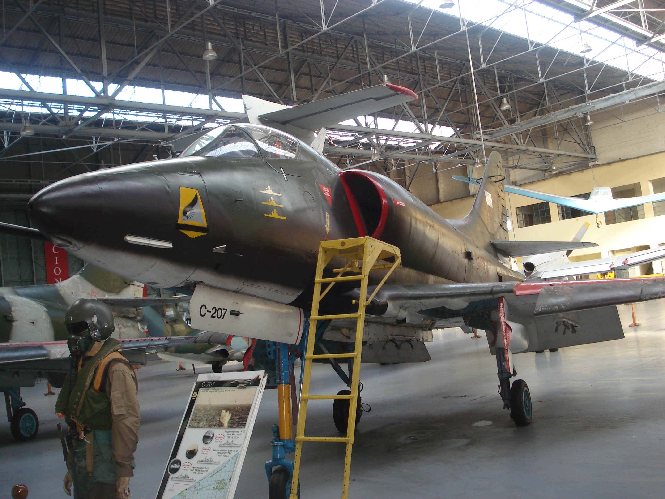 A4-Skyhawk en exposición.